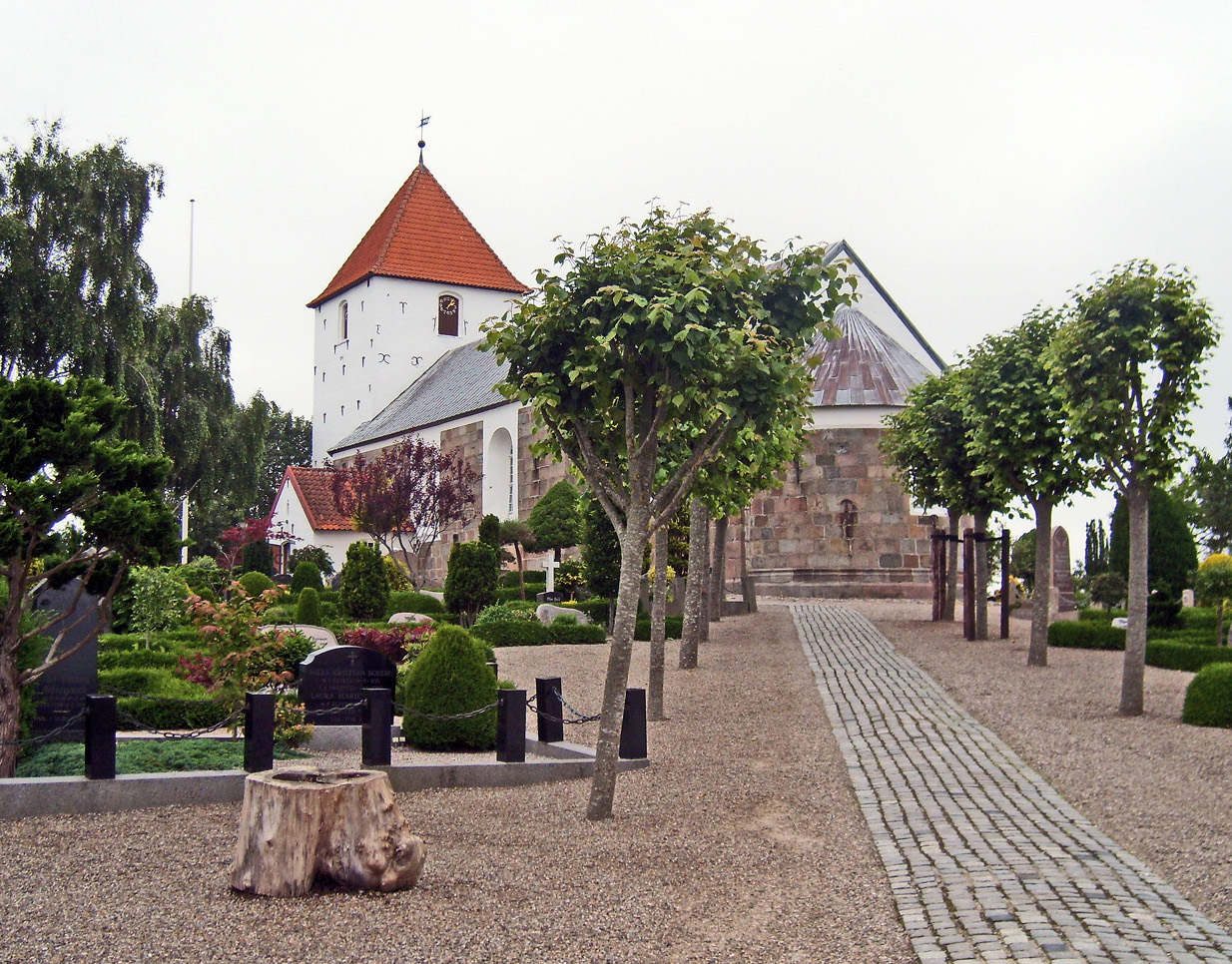 fra sydøst